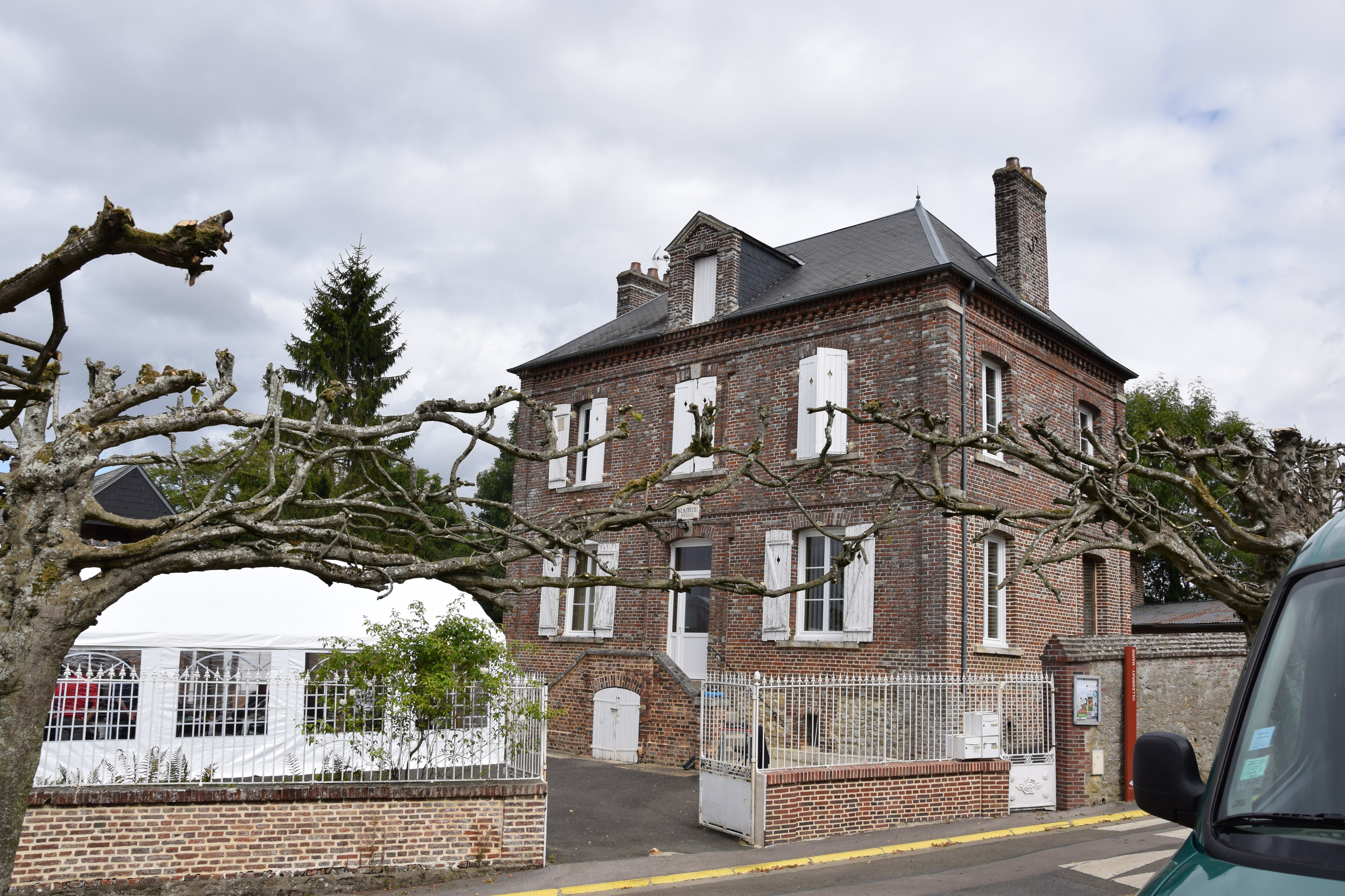 Villembray